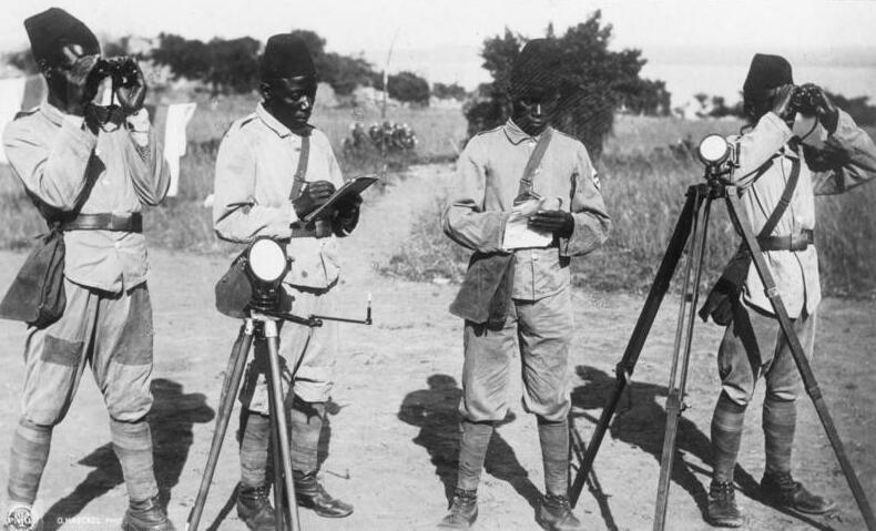 Deutsch-Ostafrika, Daressalam, Heliografen Daressalam Heliographen-Abteilung [Deutsch-Ostafrika, Daressalam.- Heliographen-Abteilung, Einheimische Angehörige der deutschen Schutztruppe (Postkartenserie - Unsere Kolonien)]